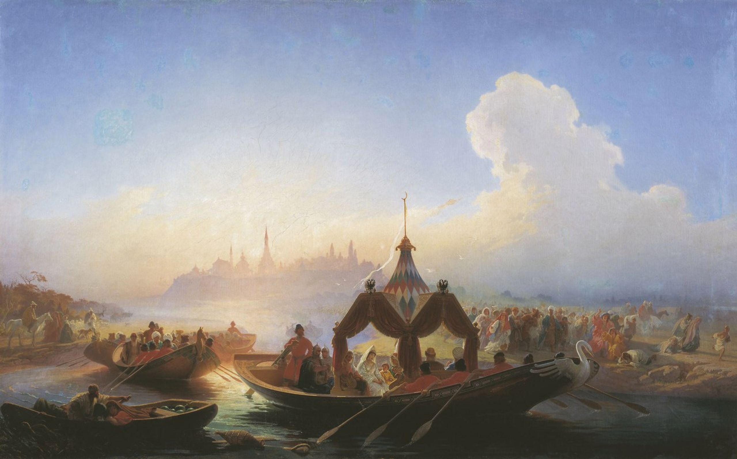 Пленённая царица Сююмбике, покидающая Казань. 1870. Холст, масло. 140 x 226 см Ульяновский художественный музей.